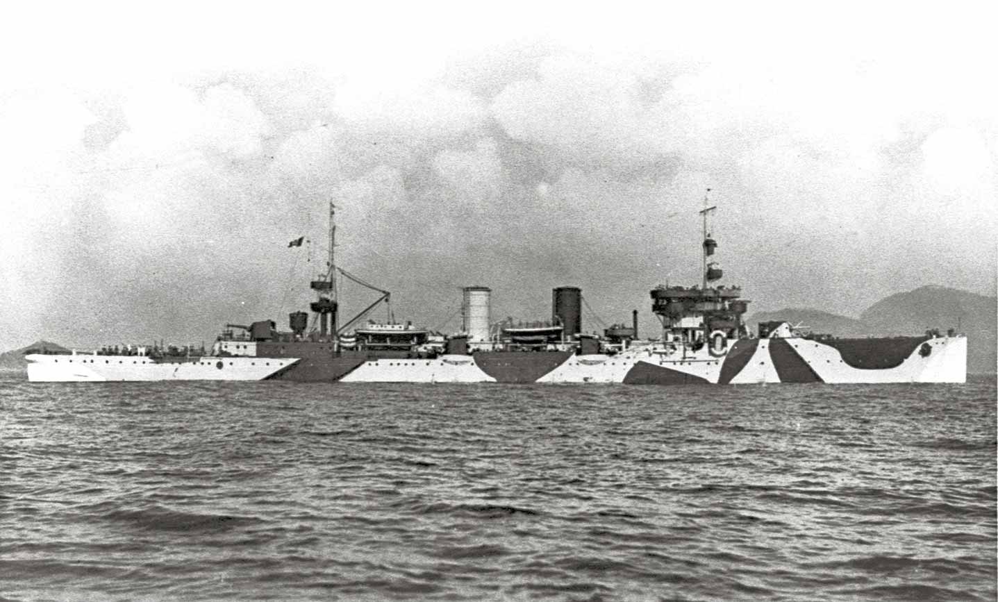 L’incrociatore leggero Bari.